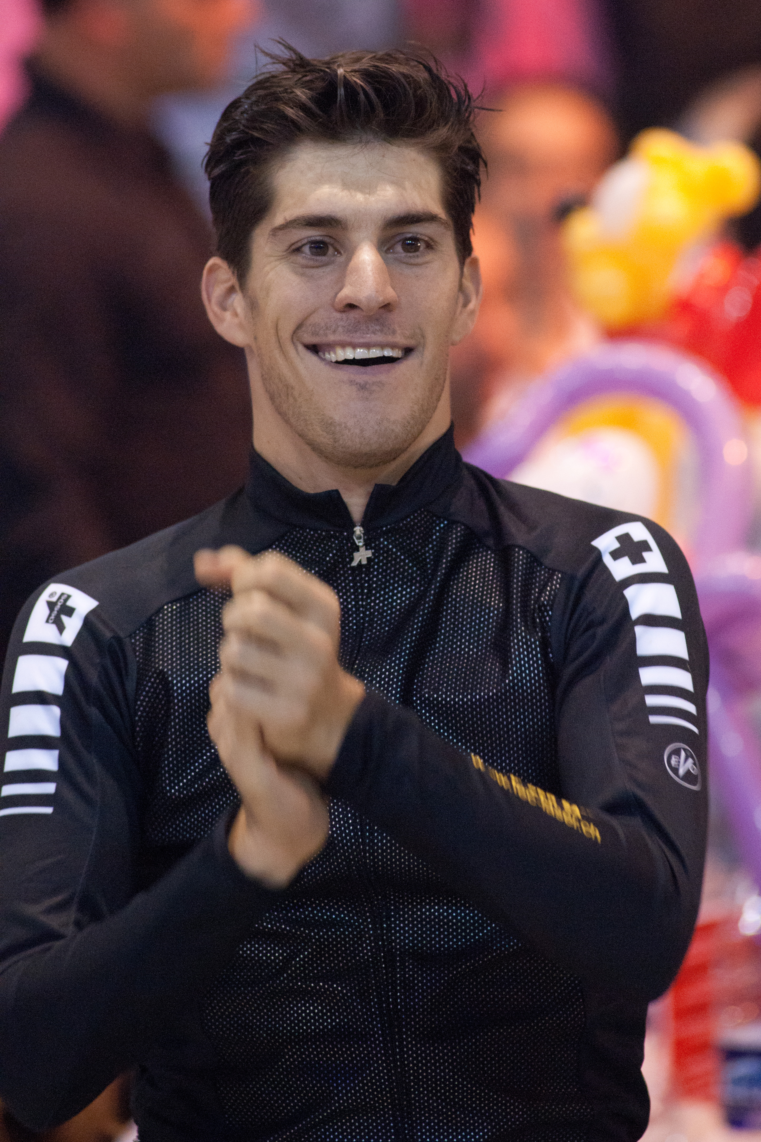 Franco Marvulli aux Six jours de Grenoble